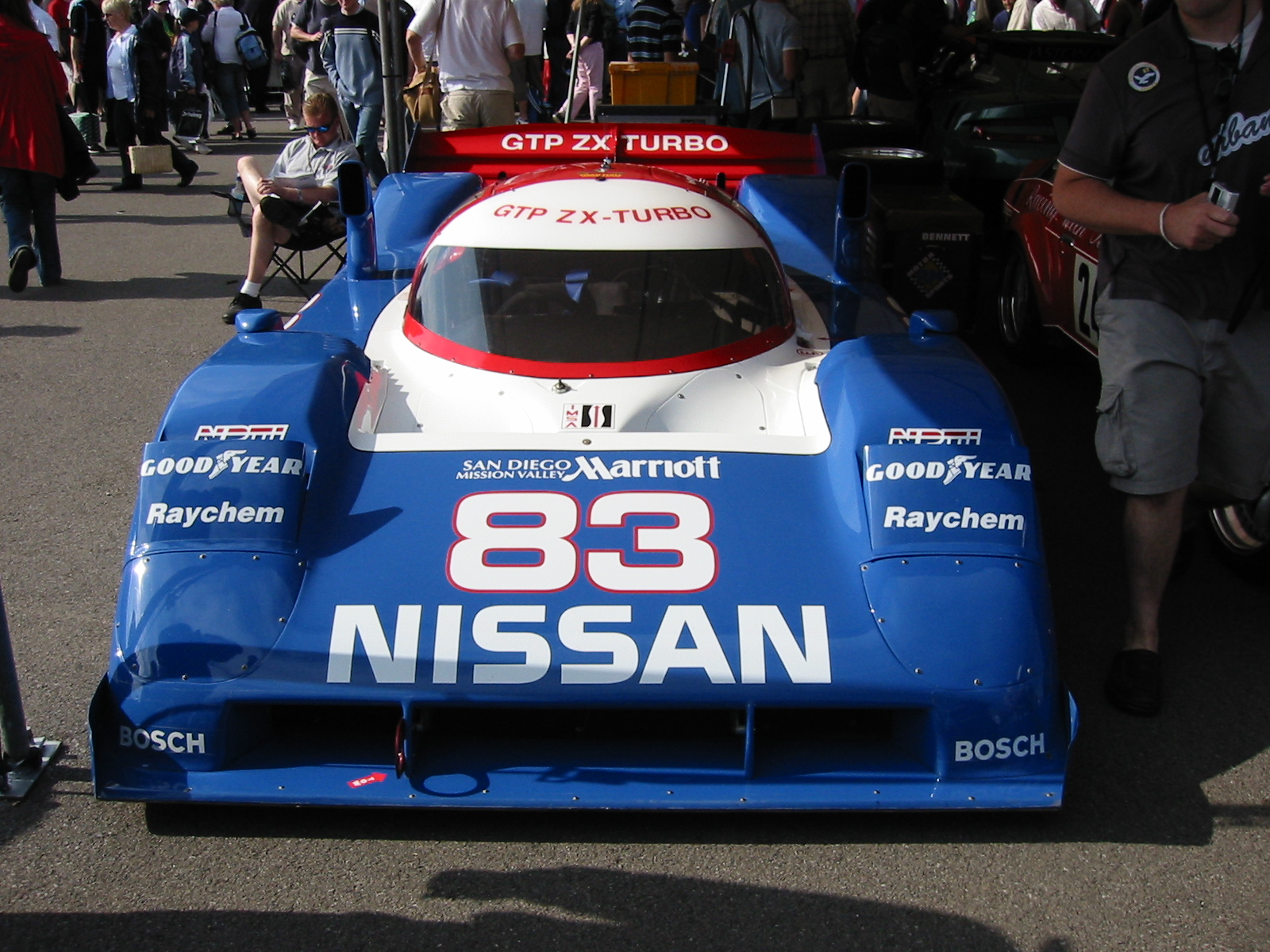 Nissan NPTI-90